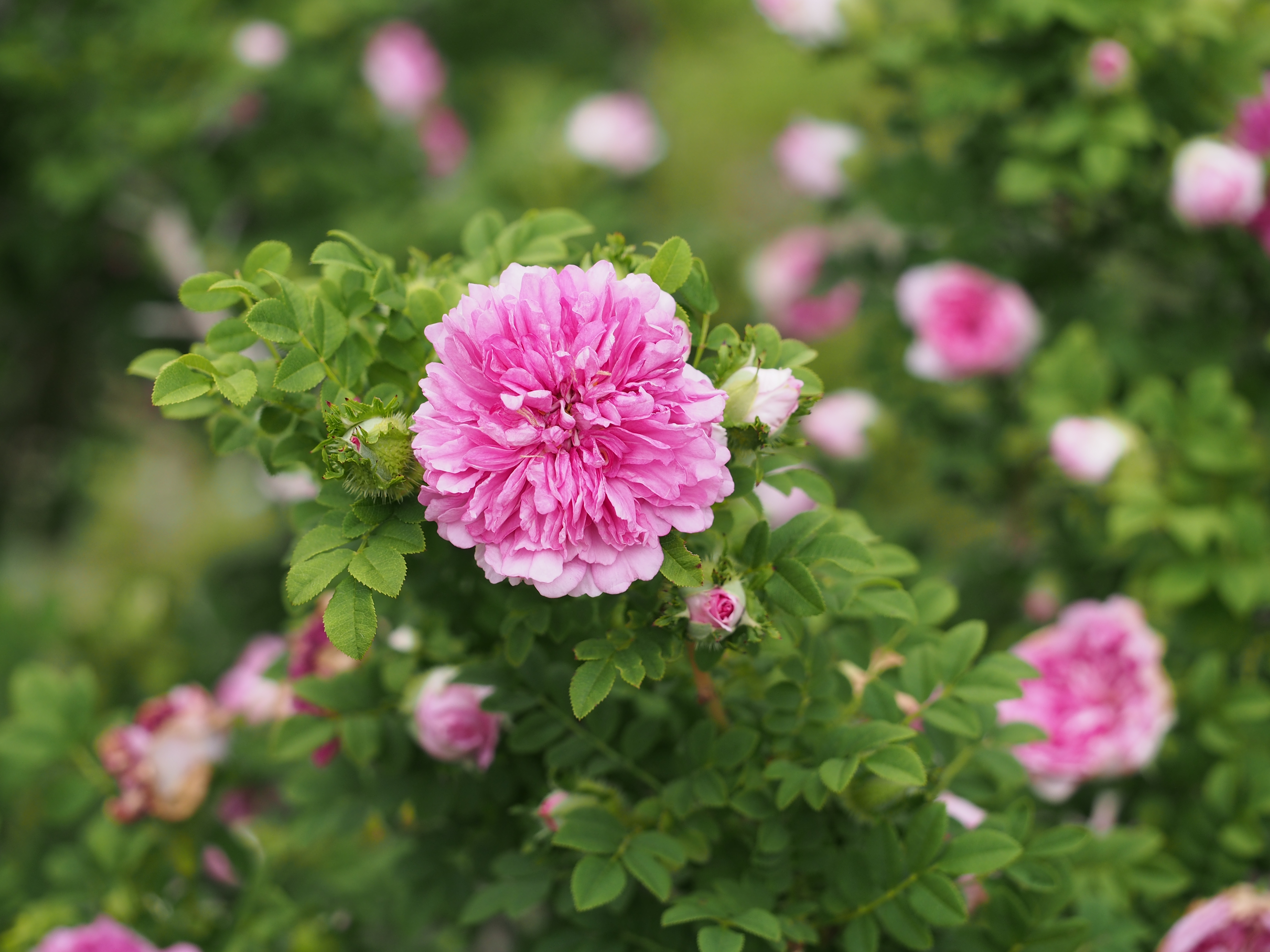 Rose, Rosa roxburghii roxburghii, バラ, イザヨイバラ, Species rose 原種